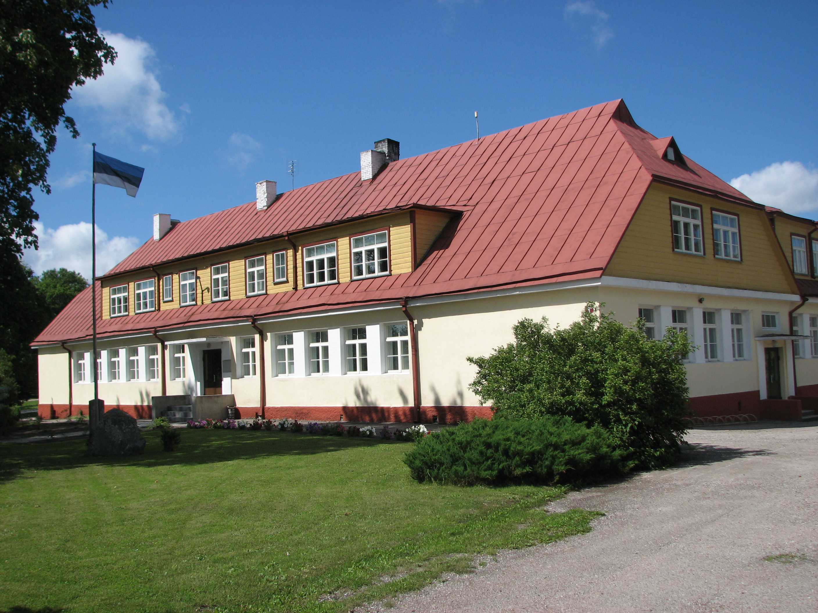 Mustjala primary school. Mustjala, Saaremaa, Estonia